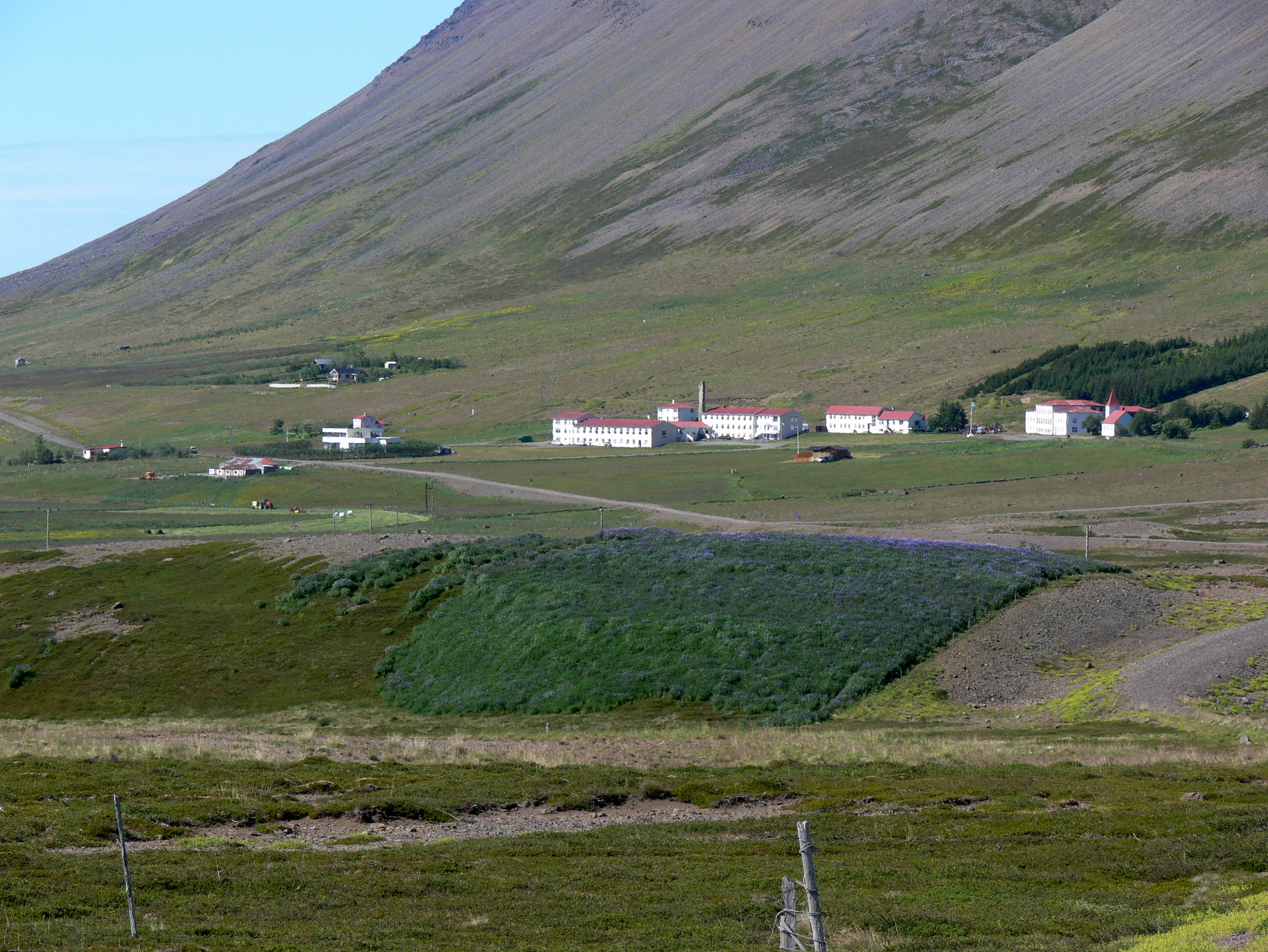 Núpur am Dýrafjörður